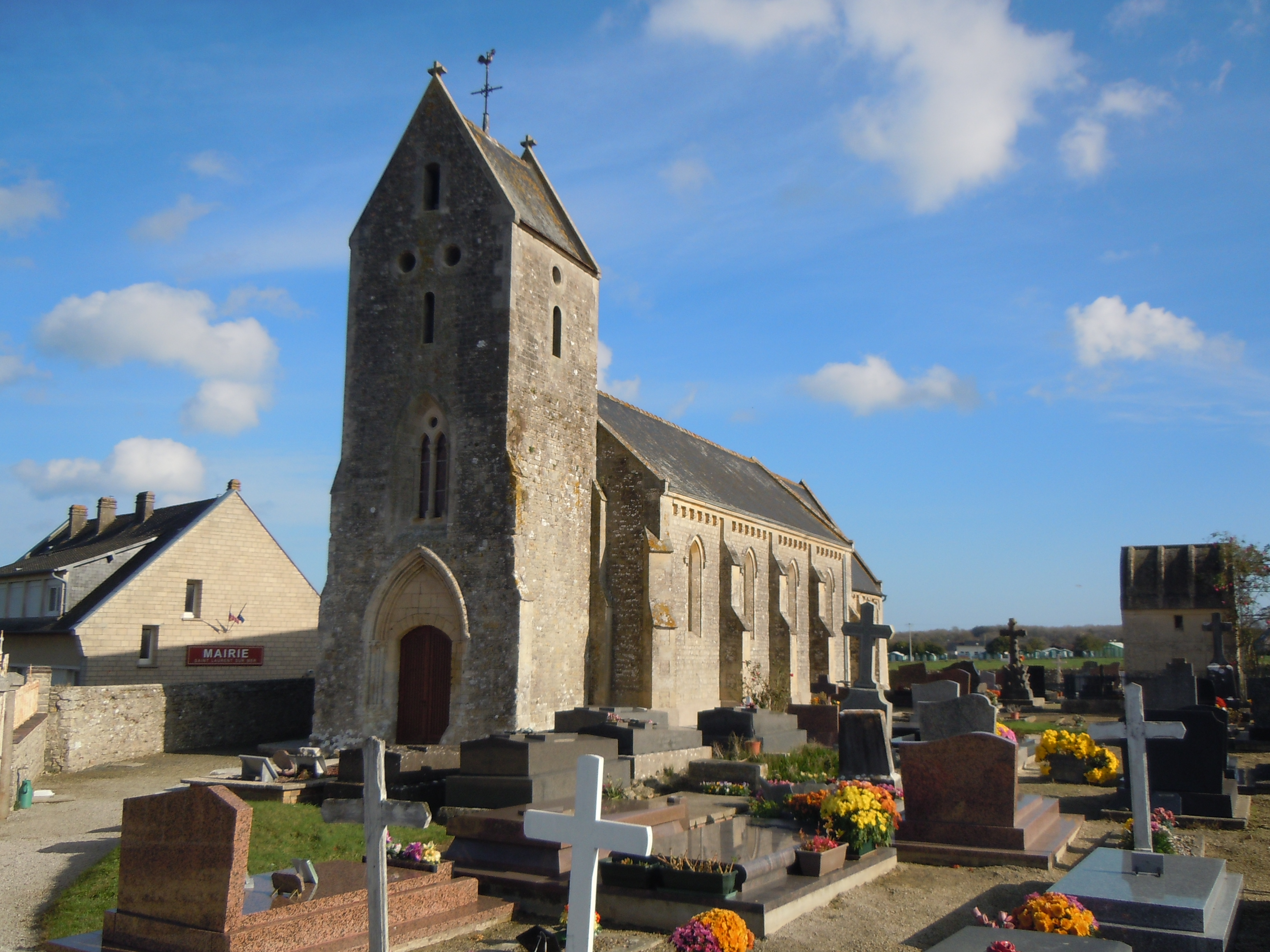 Eglise Saint-Laurent de Saint-Laurent-sur-Mer